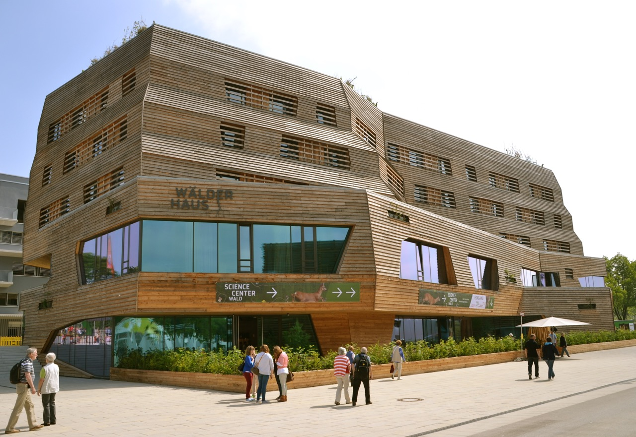 Das WÄLDERHAUS in Hamburg Wilhelmsburg, Foto: SDW